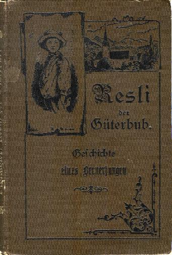 Buchumschlag von Resli, der Güterbub